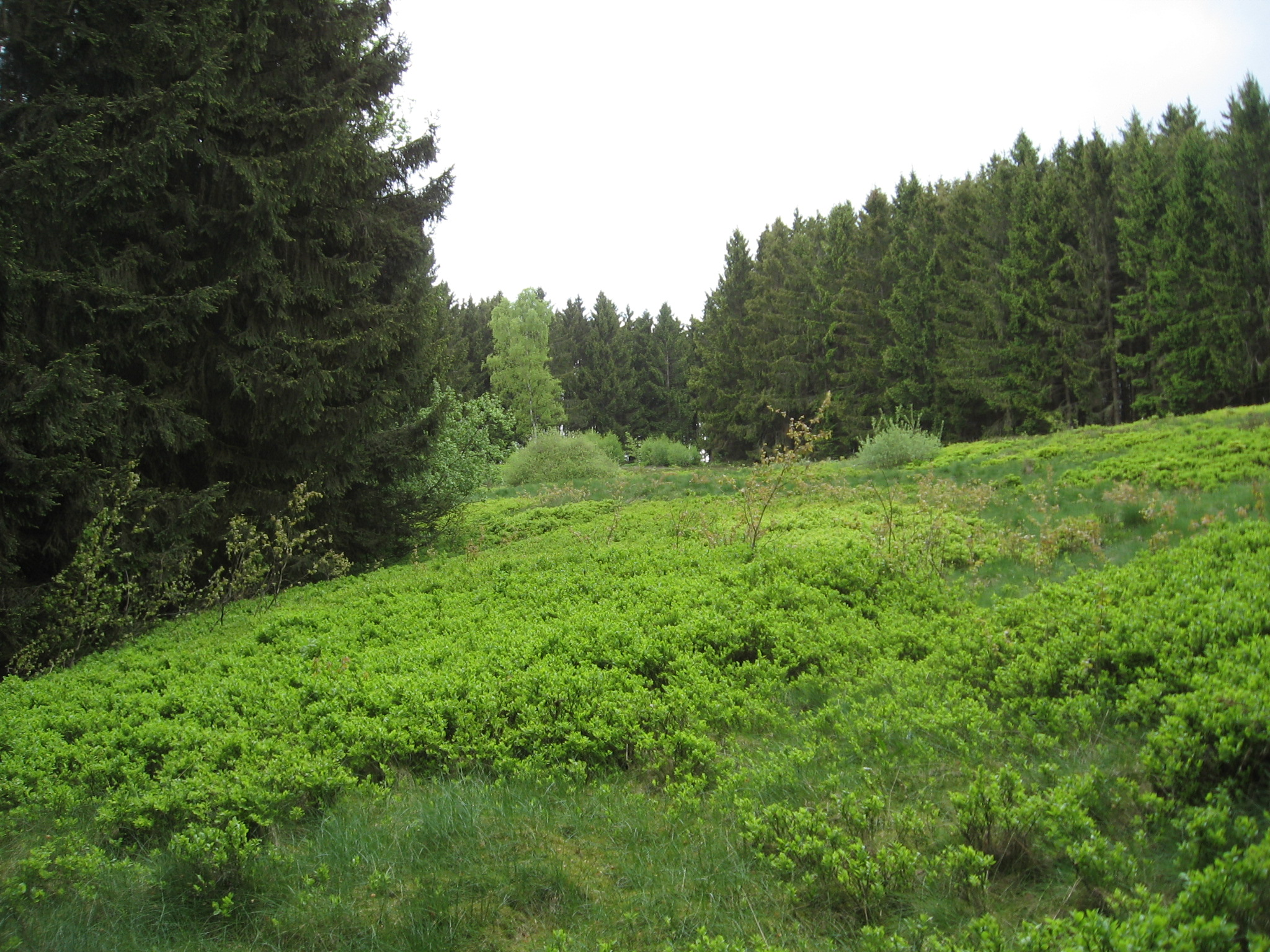 Naturschutzgebiet Gretenberg von Süden; Brilon.